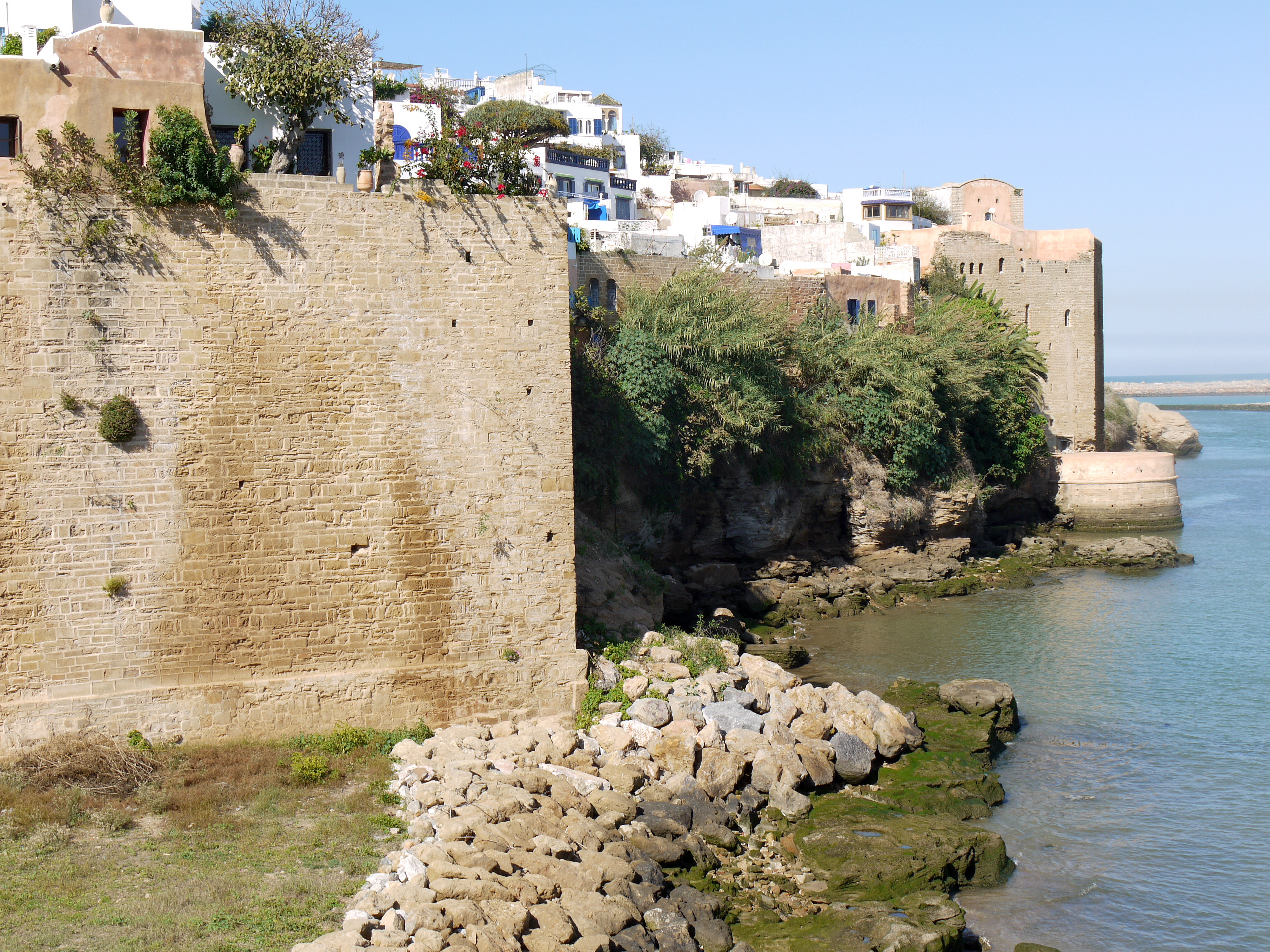 Kasbah des Oudaias vue depuis le Café Maure (Rabat, Maroc)